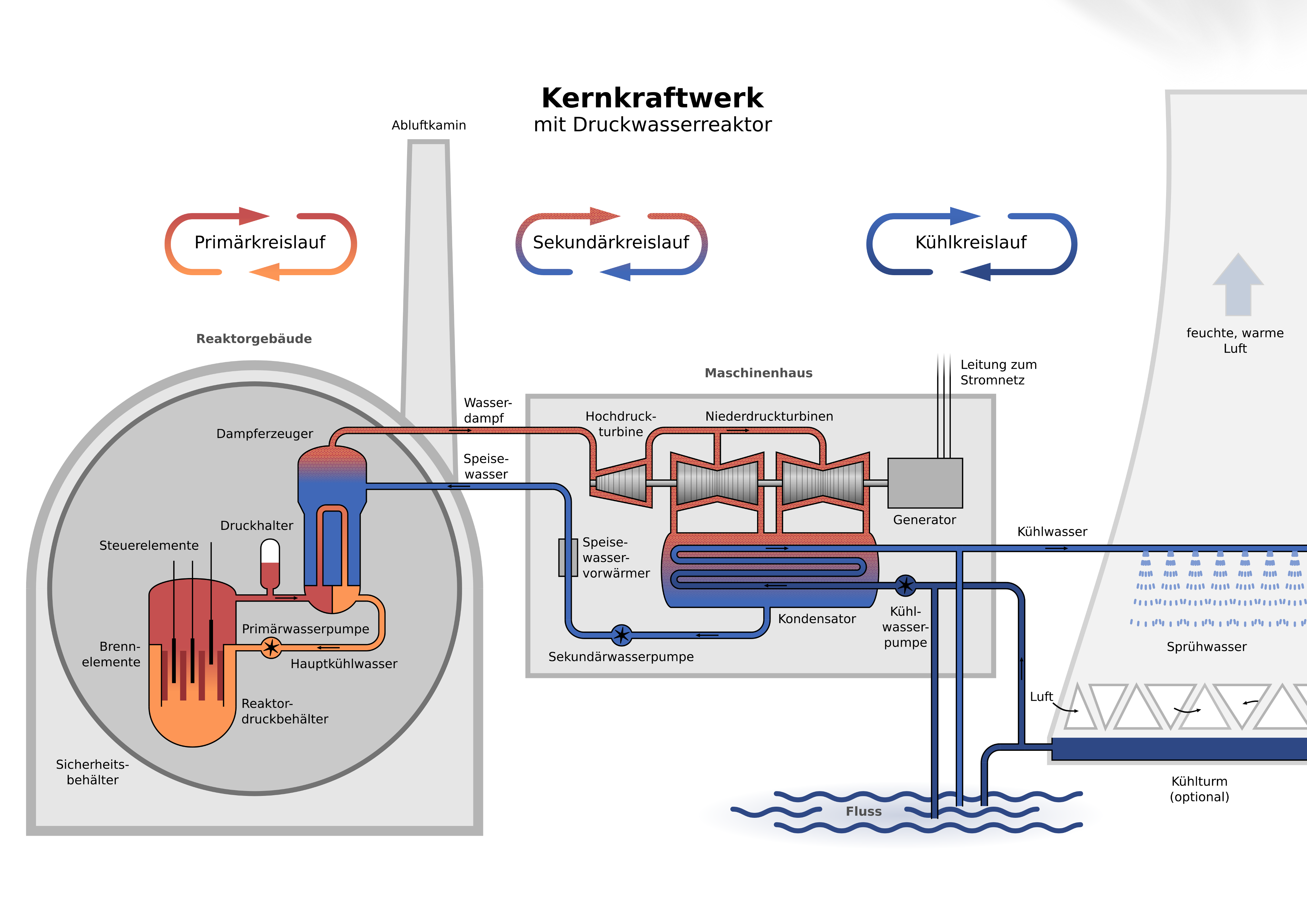 Schema eines Kernkraftwerk mit Druckwasserreaktor